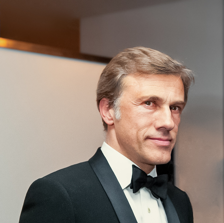 Christoph Waltz